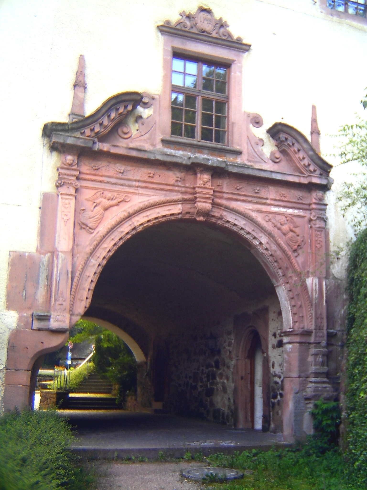 Kloster Wittichen, altes Klosterportal